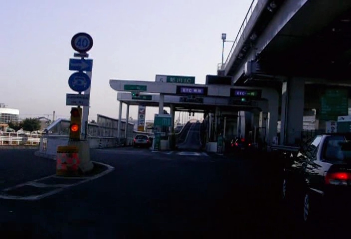 新川IC料金所を撮影。